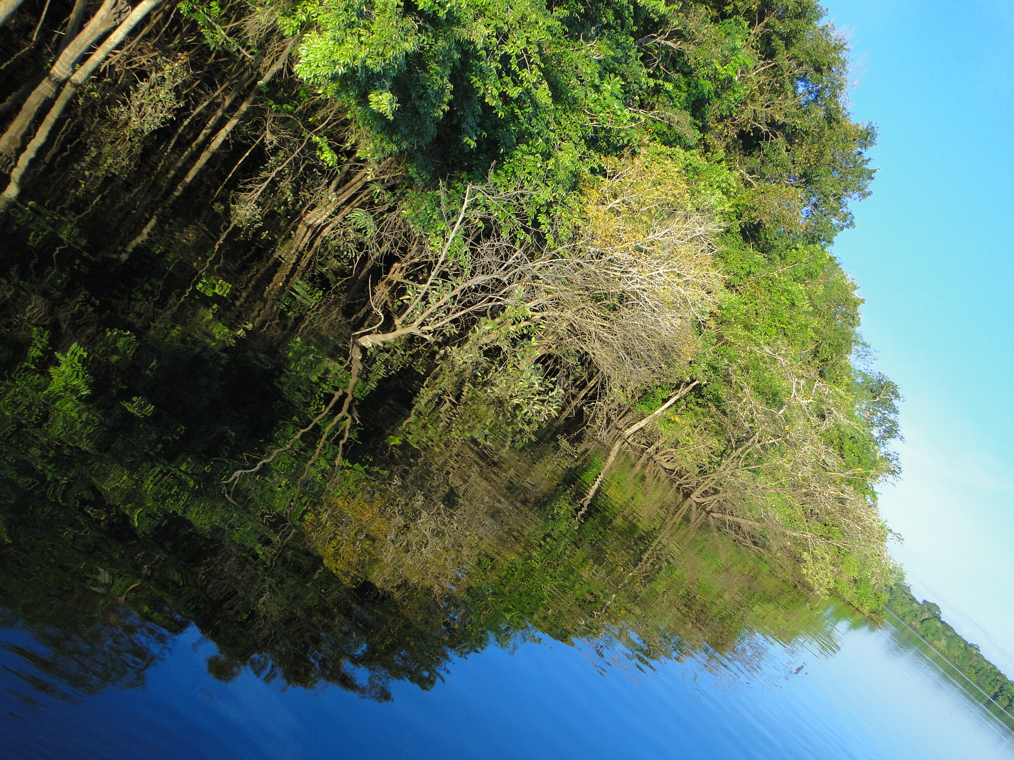 Reserva do Juma, Amazonas.